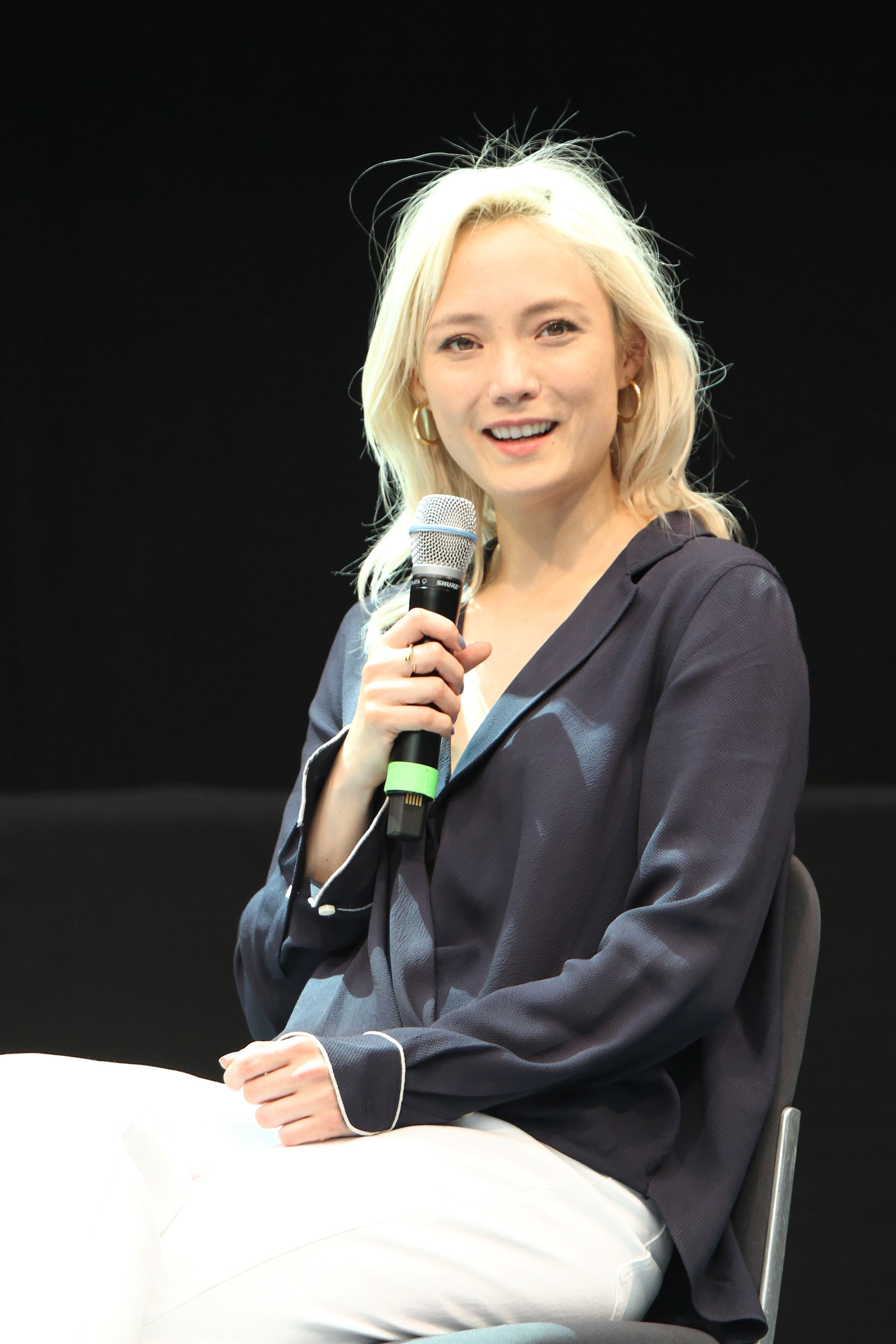 Bilder von der Comic Con Germany 2019 in Stuttgart